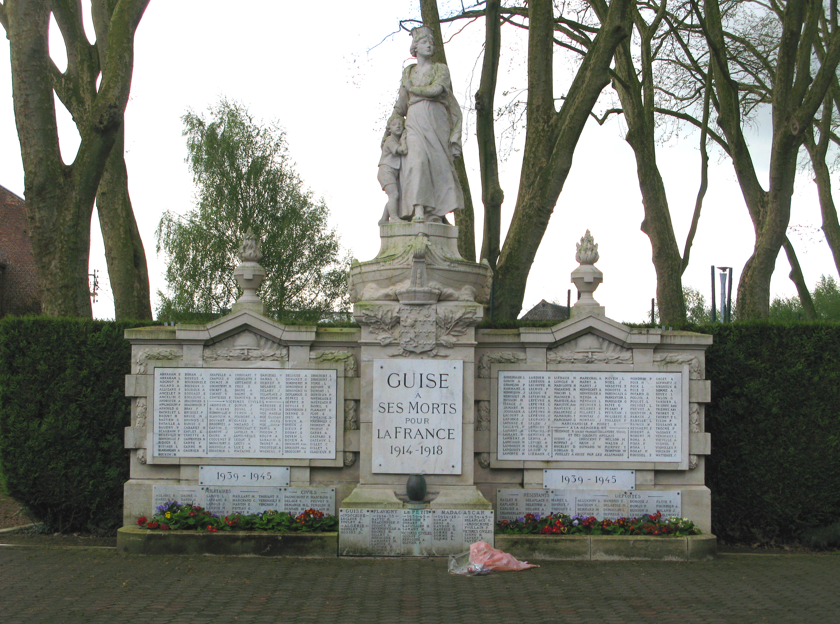 Guise (Aisne, France) - Le Monument-aux-Morts, surmonté et décoré par une statue représentant une mère et un enfant, est érigé dans le petit parc à l'angle de la rue du Jeu de Paume et du boulevard Jean Jaurès.